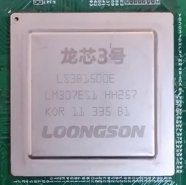 龙芯3B1500E芯片正面照